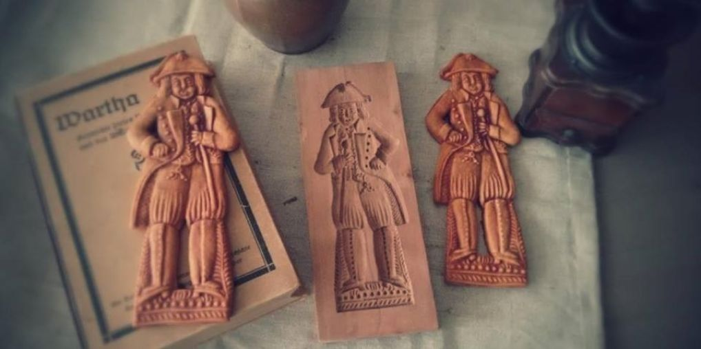 Bardzkie Pierniki wykonane przez Tomasza Karamona z drewnianej formy piernikarskiej odtworzonej na podstawie zdjęcia formy piernikarskiej autorstwa Augusta Neumanna z II poł. XIX w.